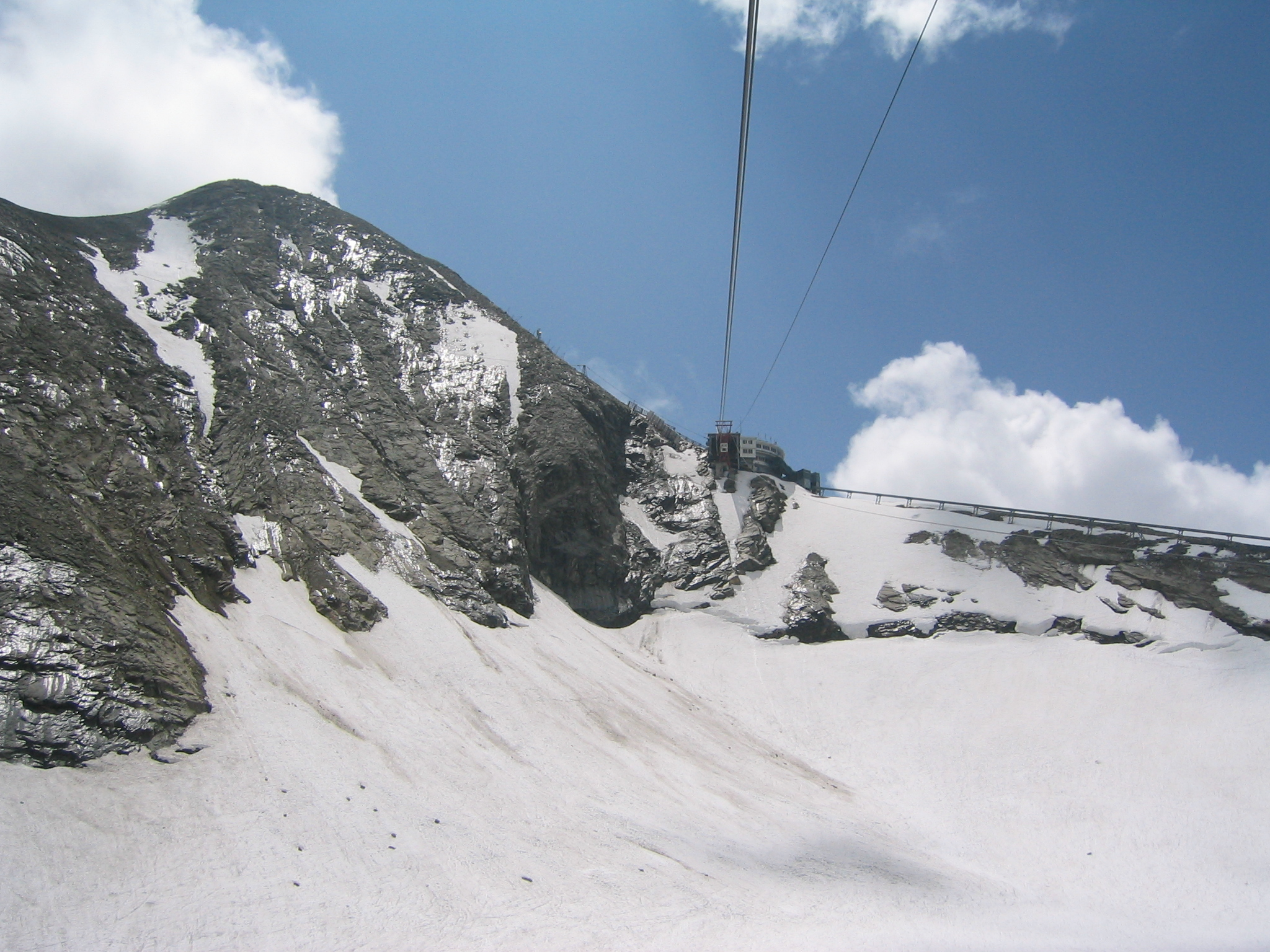 Kaprun - Gletscherbahn 1 - Laatste sectie